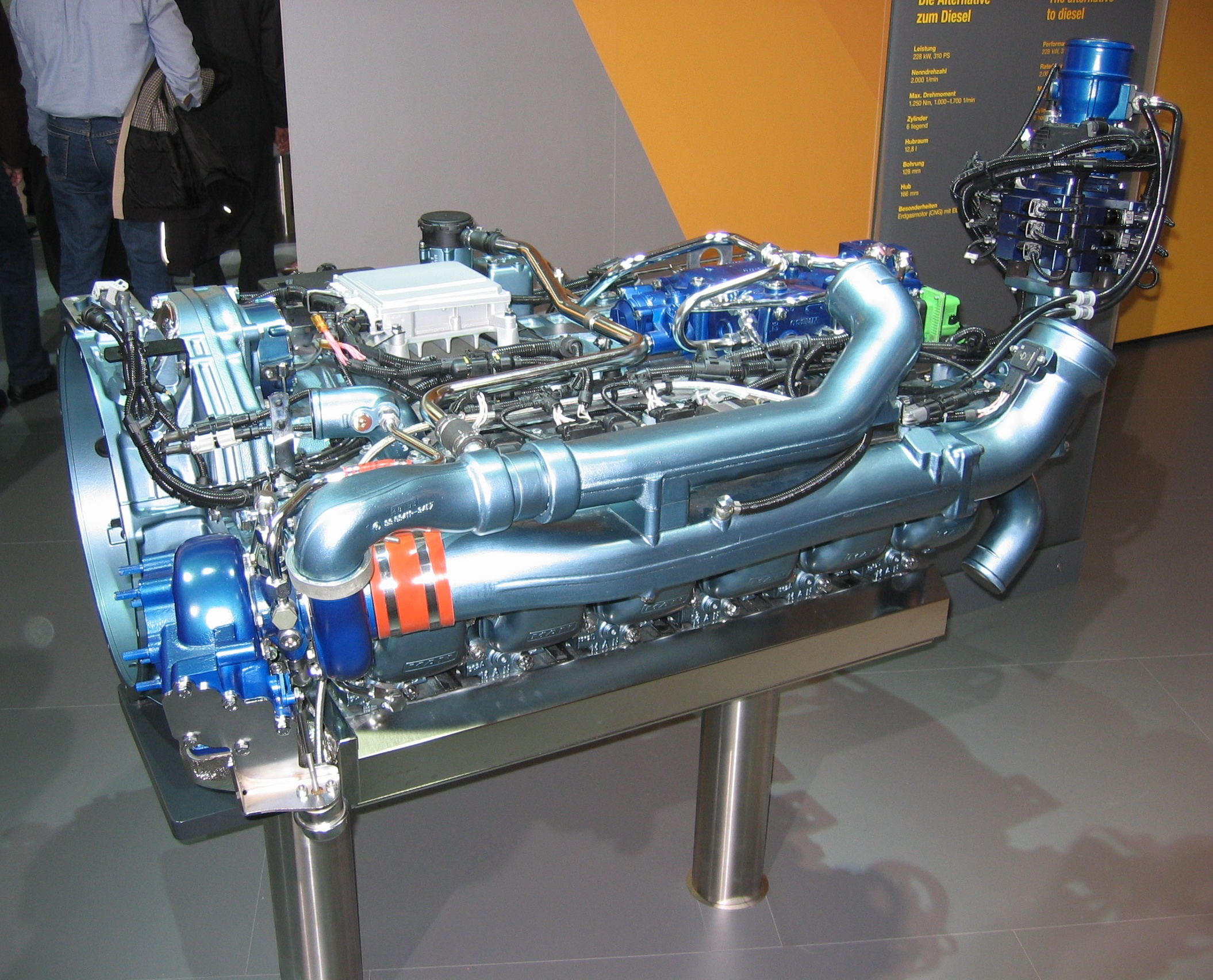 Wasserstoffverbrennungsmotor von MAN (Typ H2876UH)